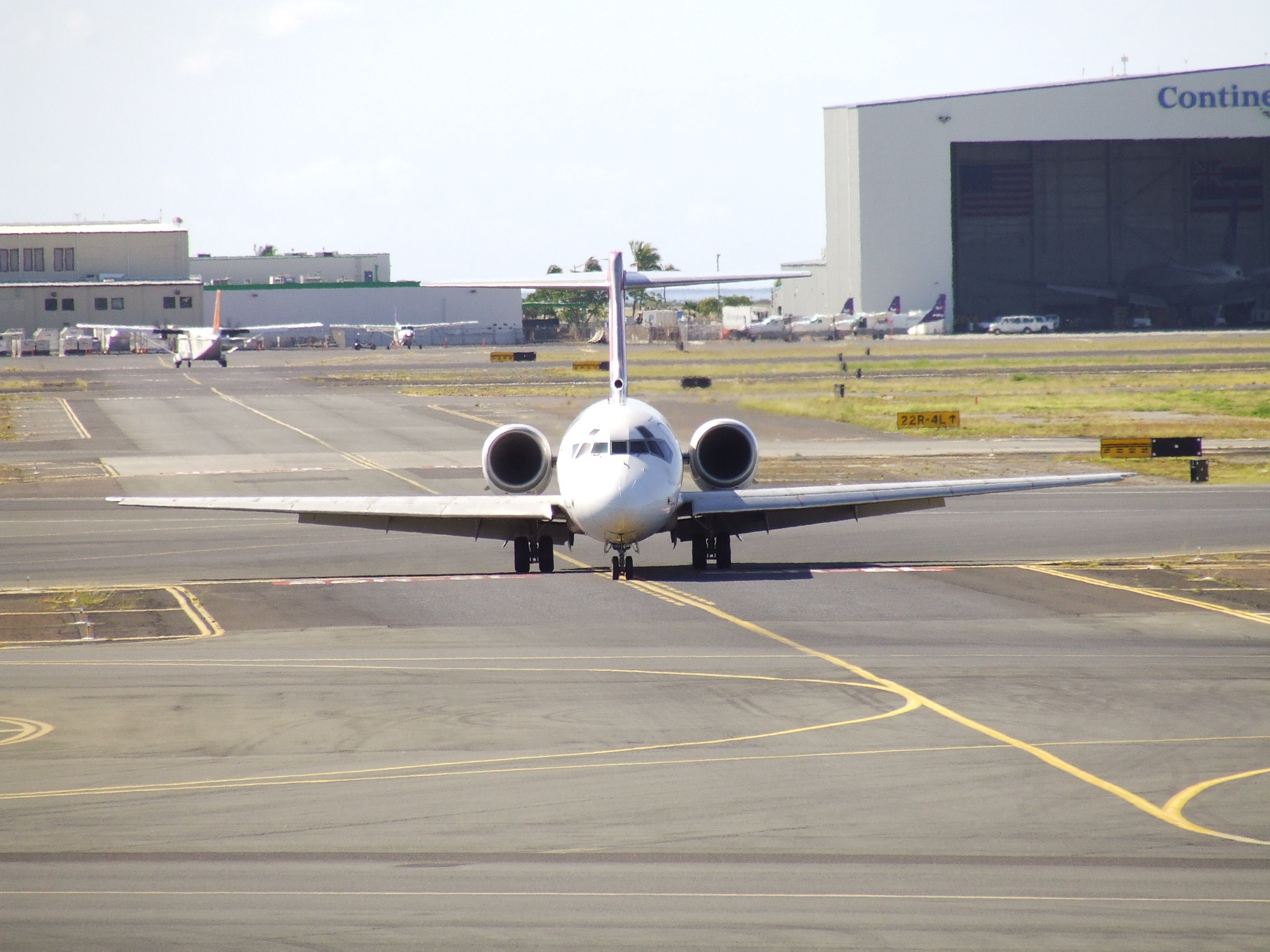 Honolulu taxiway